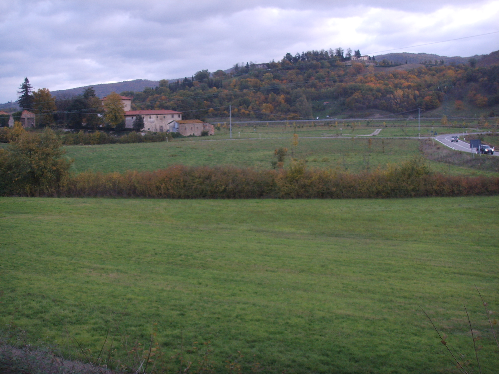 Barberino di mugello, campi